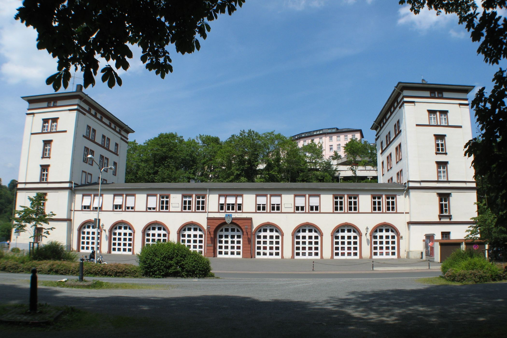 Die Hainkaserne in Weilburg ist heute Sitz der Feuerwehr